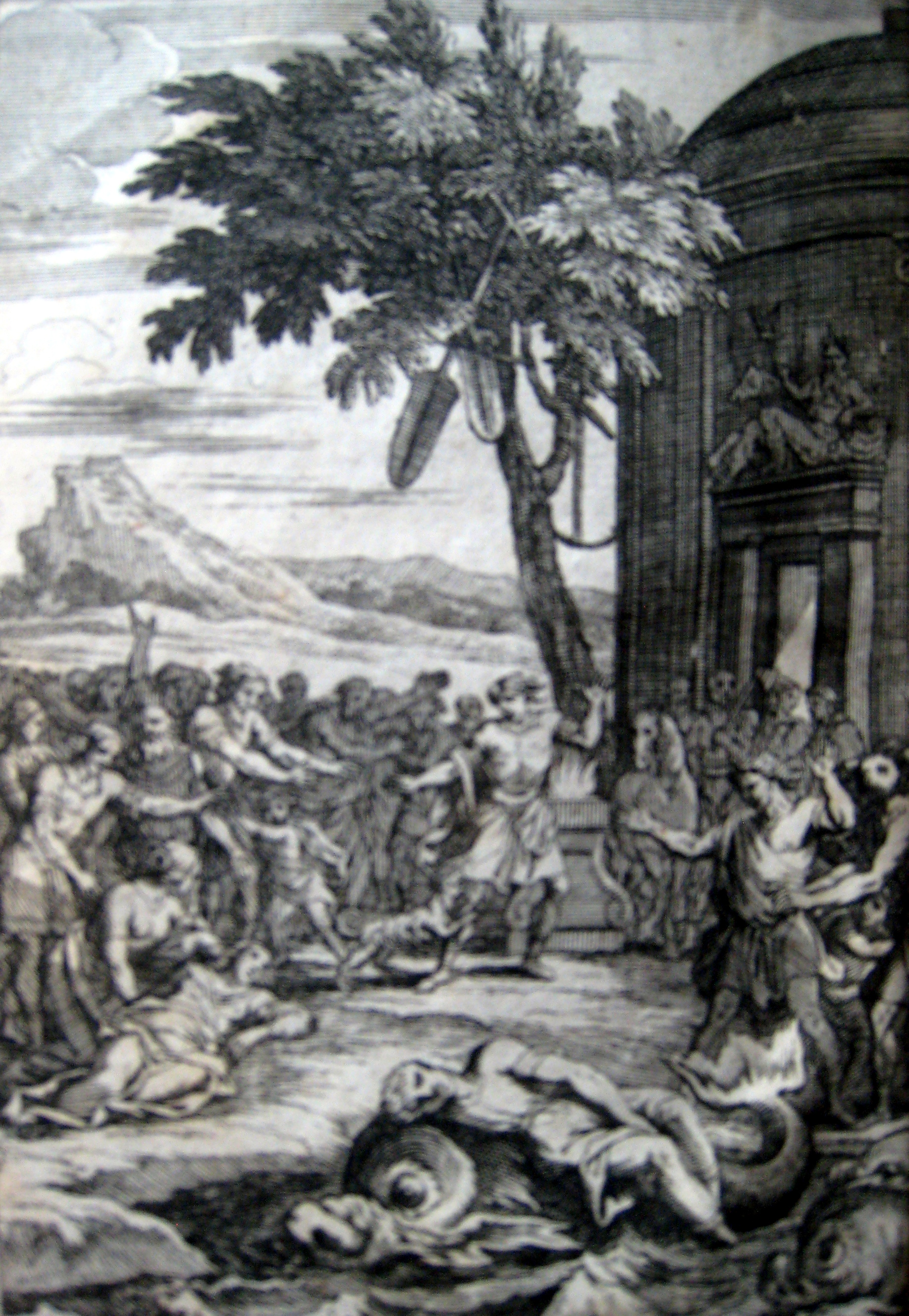 En kobberstikk-illustrasjon fra boka Clelie Histoire Romaine, 1660.